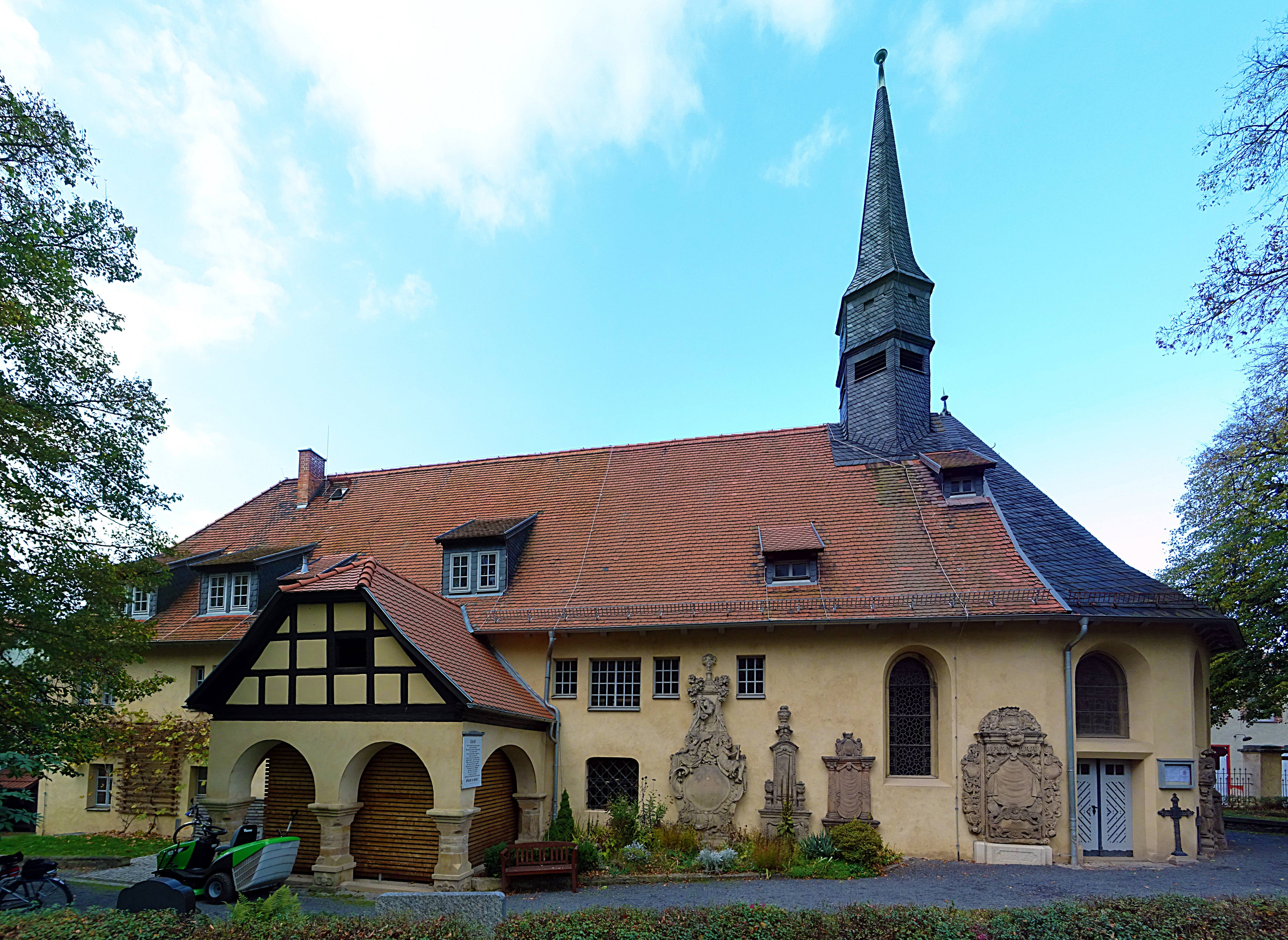 Hospitalkirche St. Laurentius (Neustadt an der Orla) von Südost